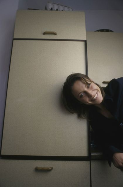 Berrit Arnold, Schauspielerin fotografiert am 19.06.1997 in ihrer Küche in München